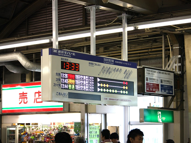 Panneau indicateur de départs à la station Hamamatsucho du monorail de Tokyo